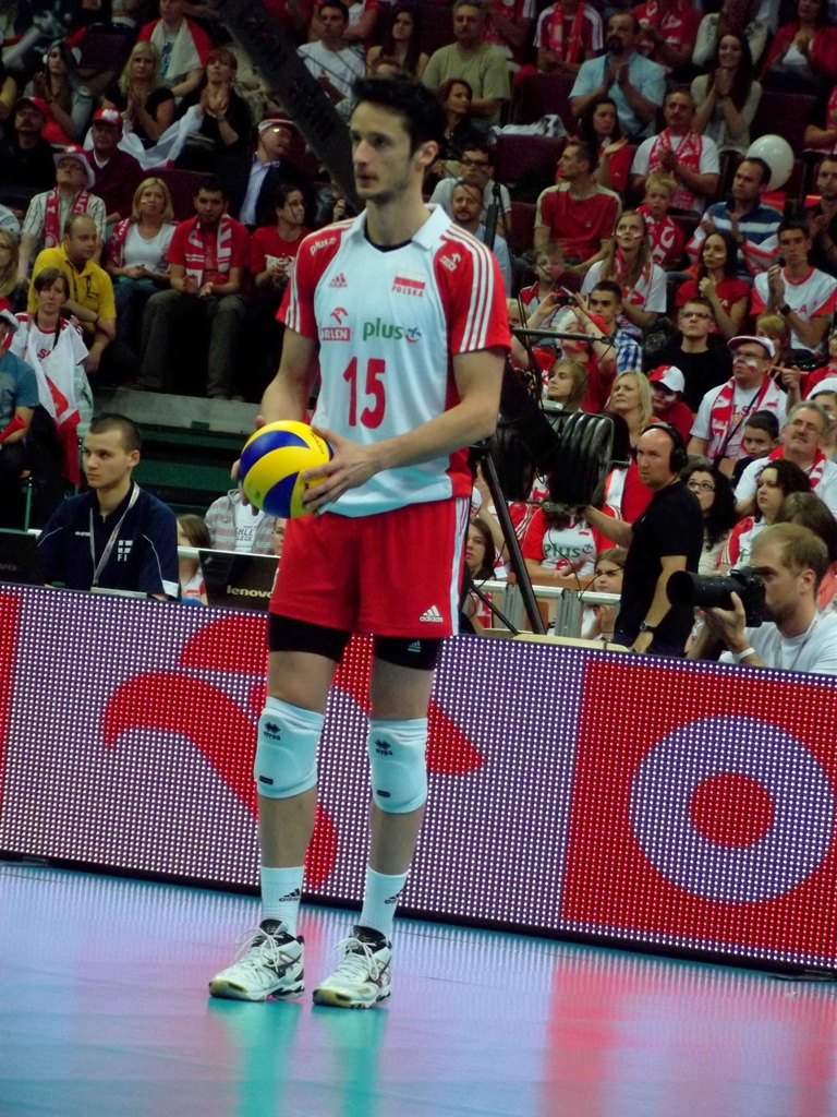 Zdjęcie zrobione podczas zawodów Ligi Światowej 2012 w katowickim Spodku.